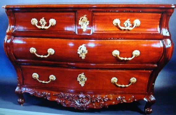 Commode dite "Bordelaise" acajou de Cuba, antiquaire Philippe Glédel (Fougères)